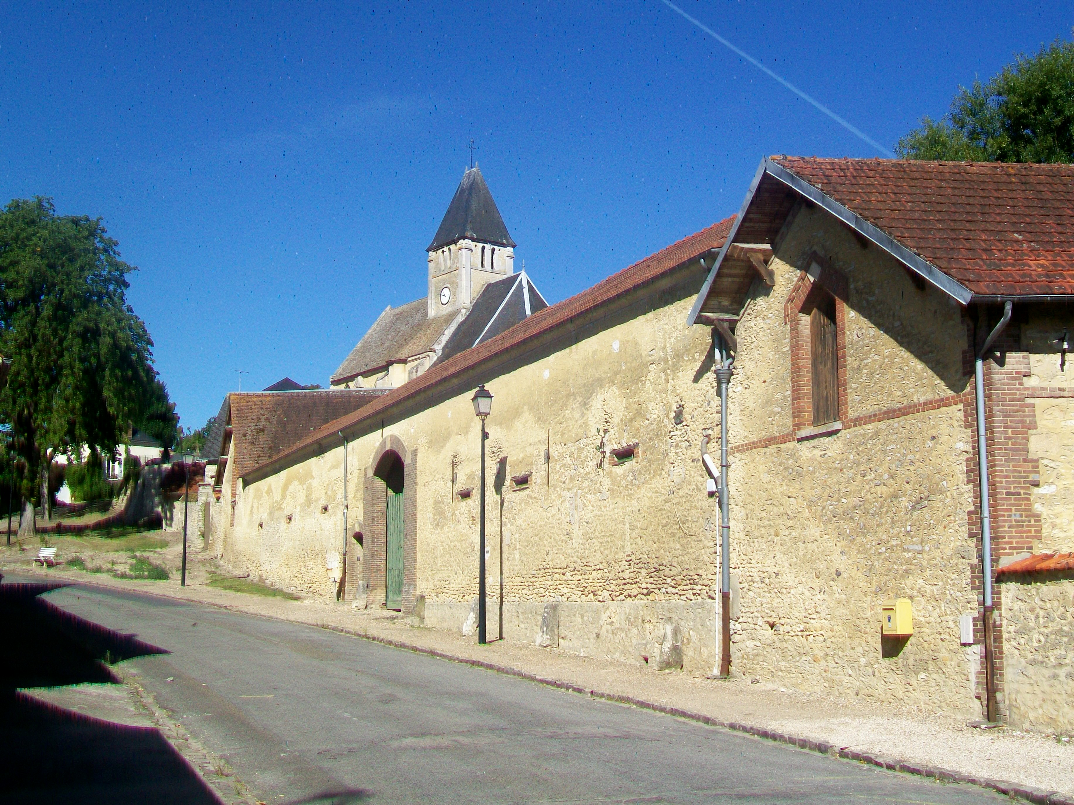 La rue de Molincourt ; au fond, l'église Saint-Ouen.